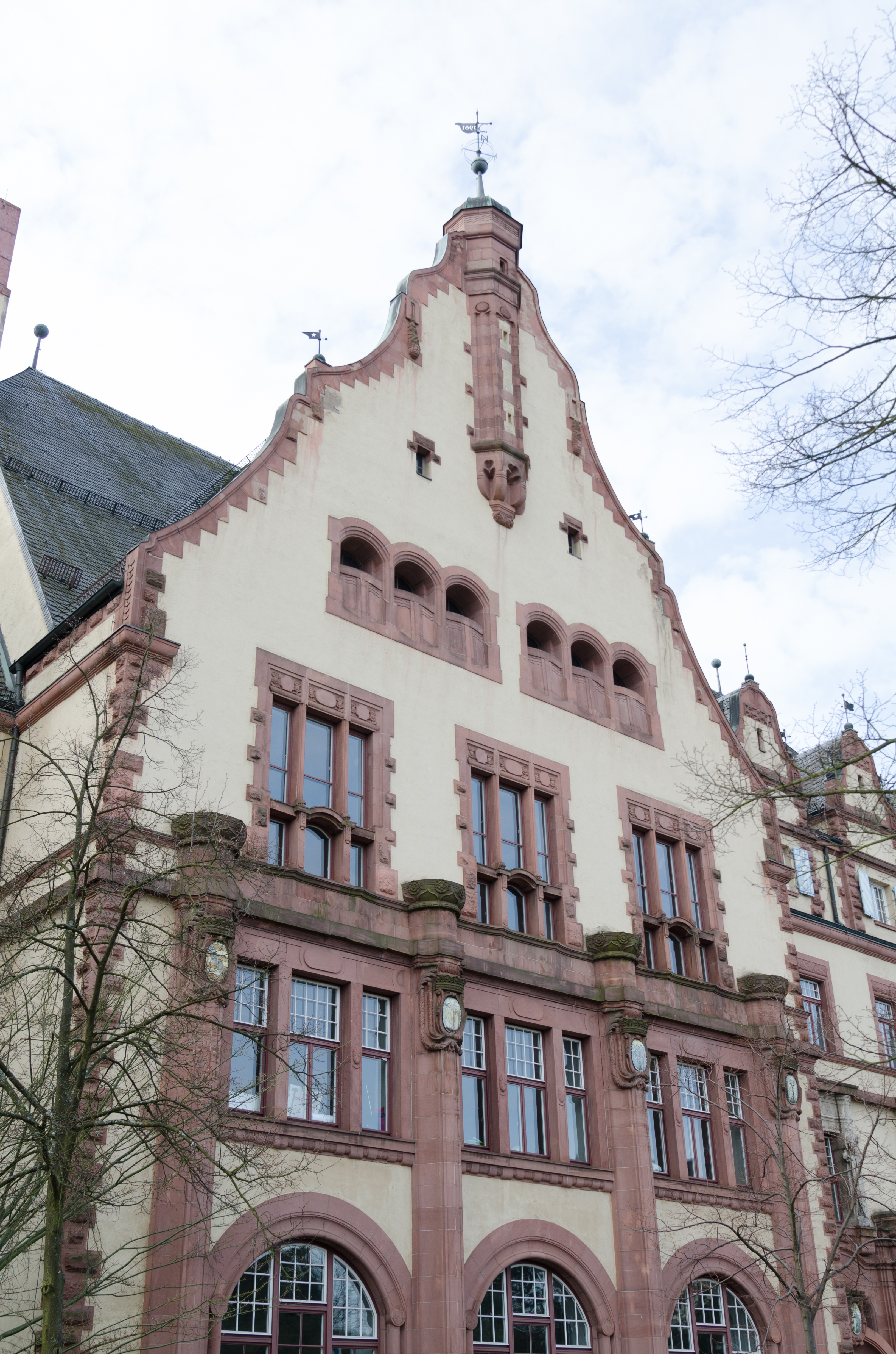 Aschaffenburg, Grünewaldstraße 18, Dalberg Gymnasium